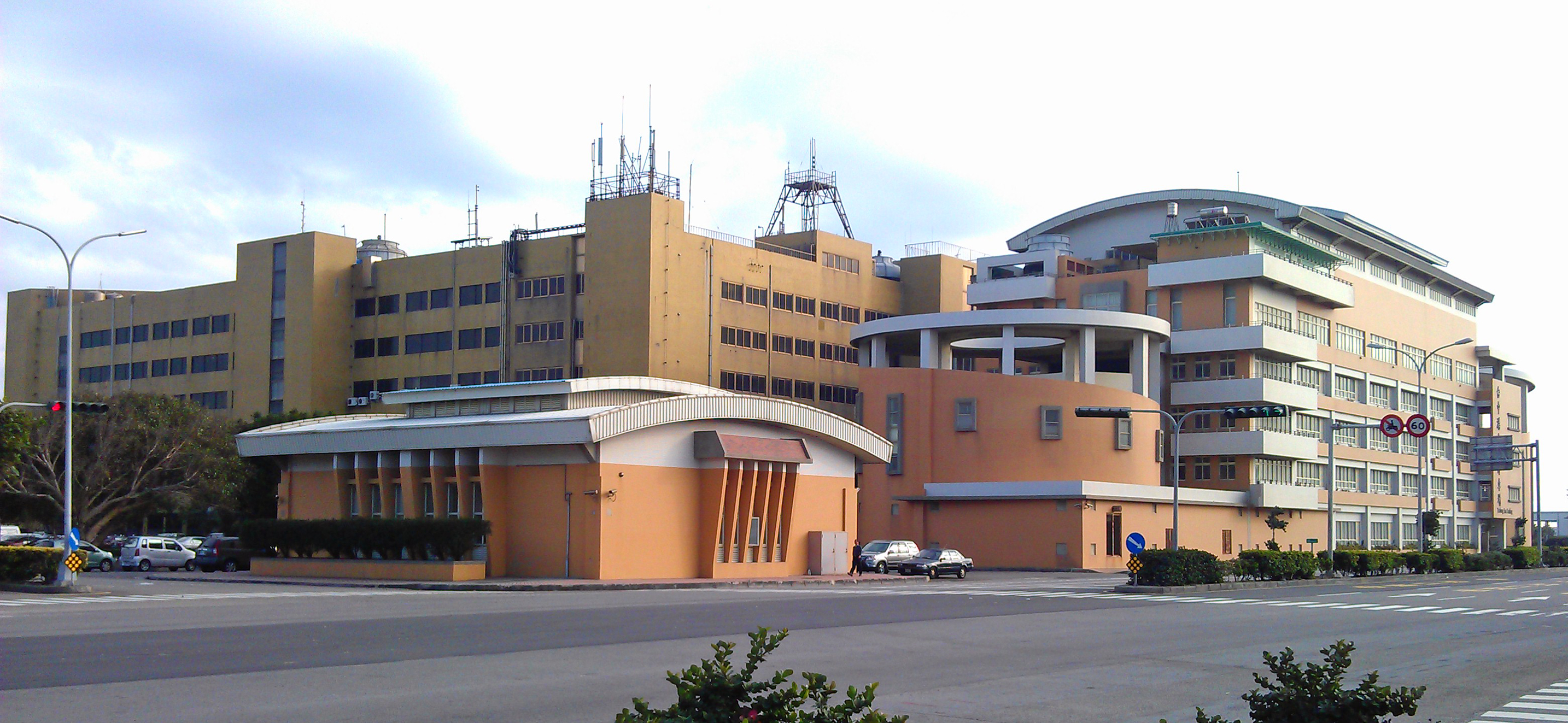 中文（台灣）: 海港聯合辦公大樓